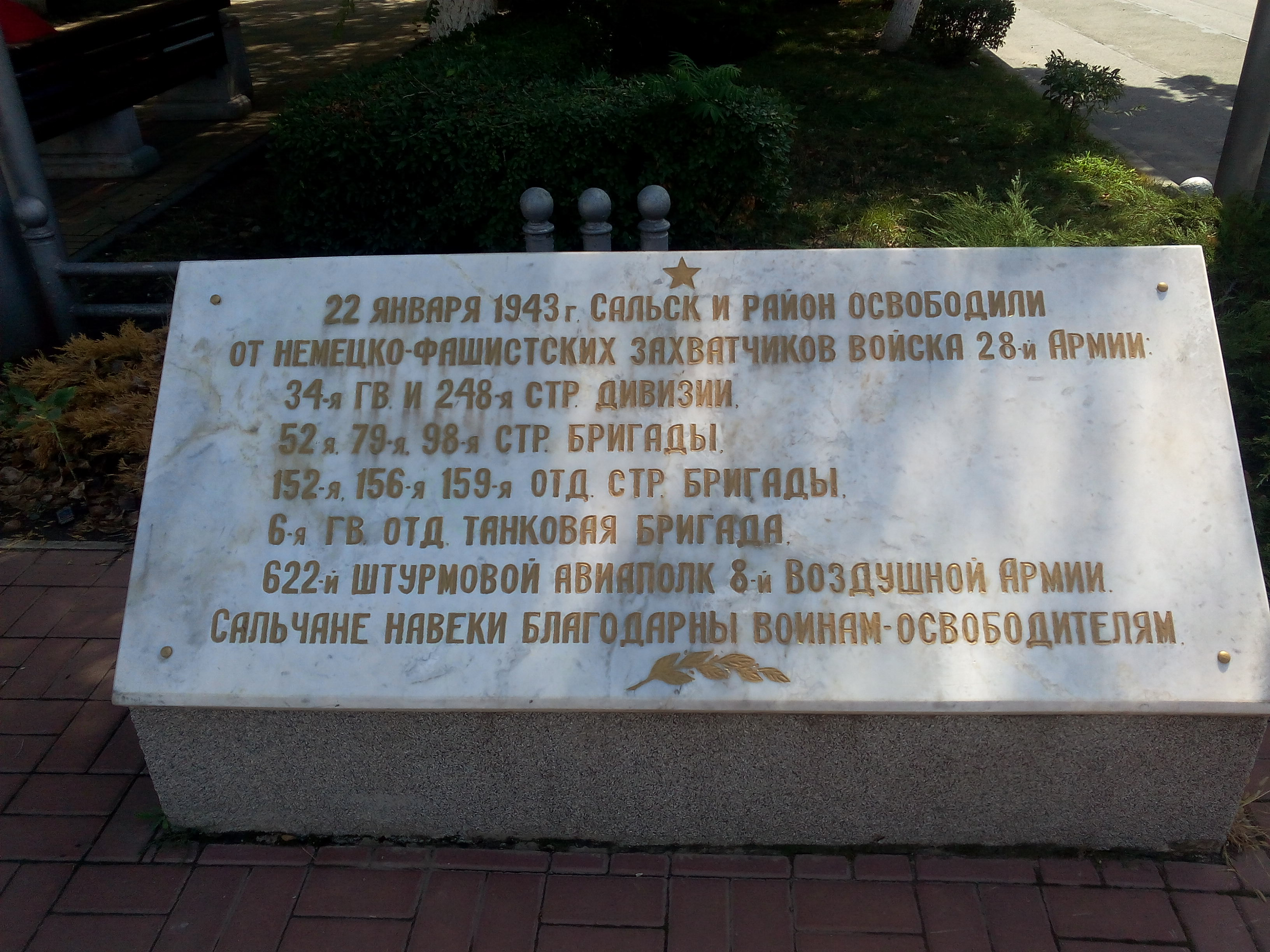 г. Сальск, памятная мемориальная доска в честь освободителей Сальска от немецко-фашистских захватчиков